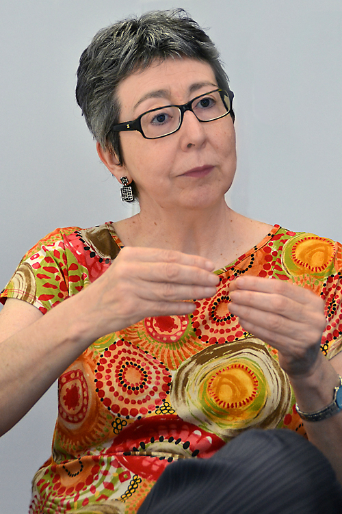 Frantziako matematikari euskalduna